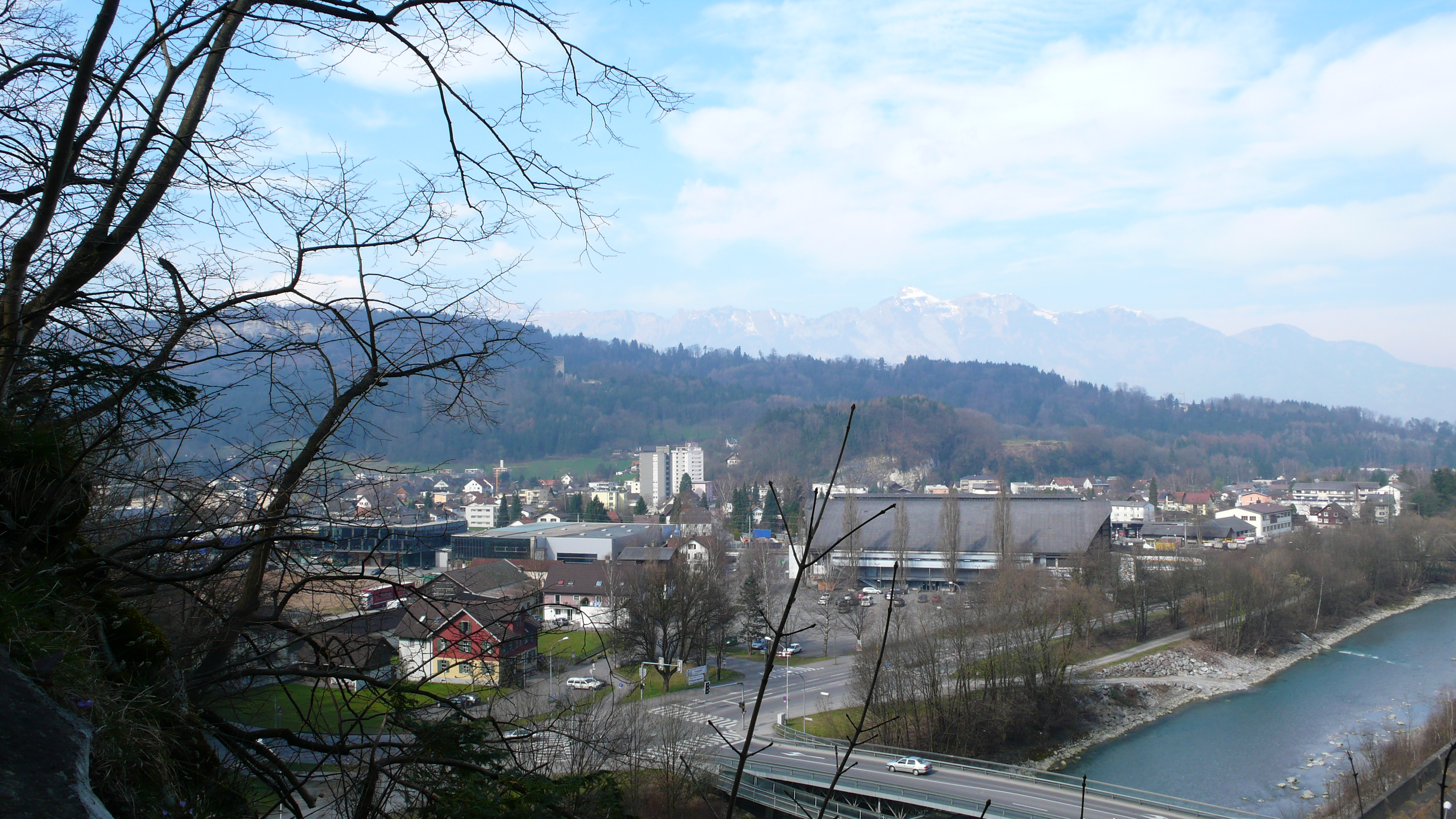 Tosters, Blick vom Veitskapf